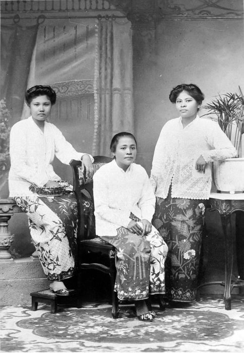 Repronegatief. Jonge vrouwen van het eiland Sangihe bij Noord-Celebes